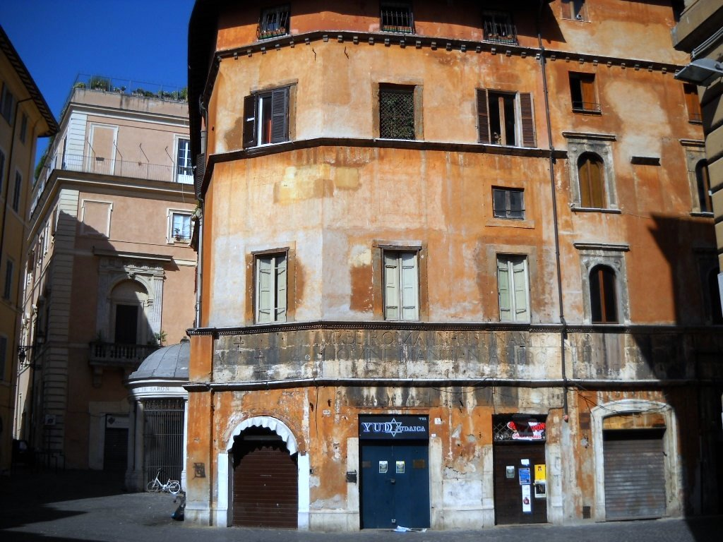 roma ghetto